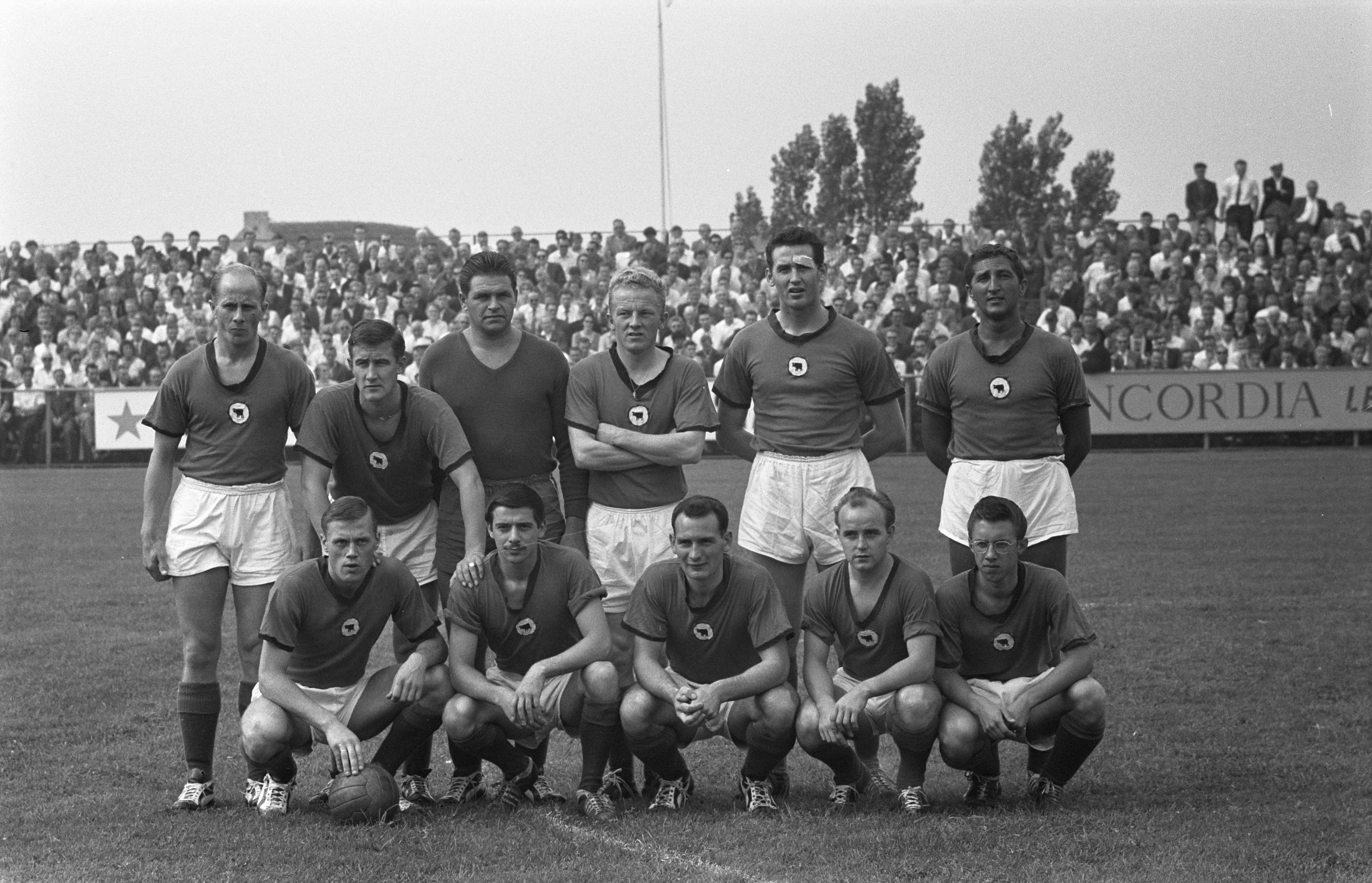 Collectie / Archief : Fotocollectie Anefo Reportage / Serie : [ onbekend ] Beschrijving : Volendam tegen DWSA 3-1, elftal van DWSA Datum : 23 augustus 1959 Fotograaf : Pot, Harry / Anefo Auteursrechthebbende : Nationaal Archief Materiaalsoort : Negatief (zwart/wit) Nummer archiefinventaris : bekijk toegang 2.24.01.05 Bestanddeelnummer : 910-6226